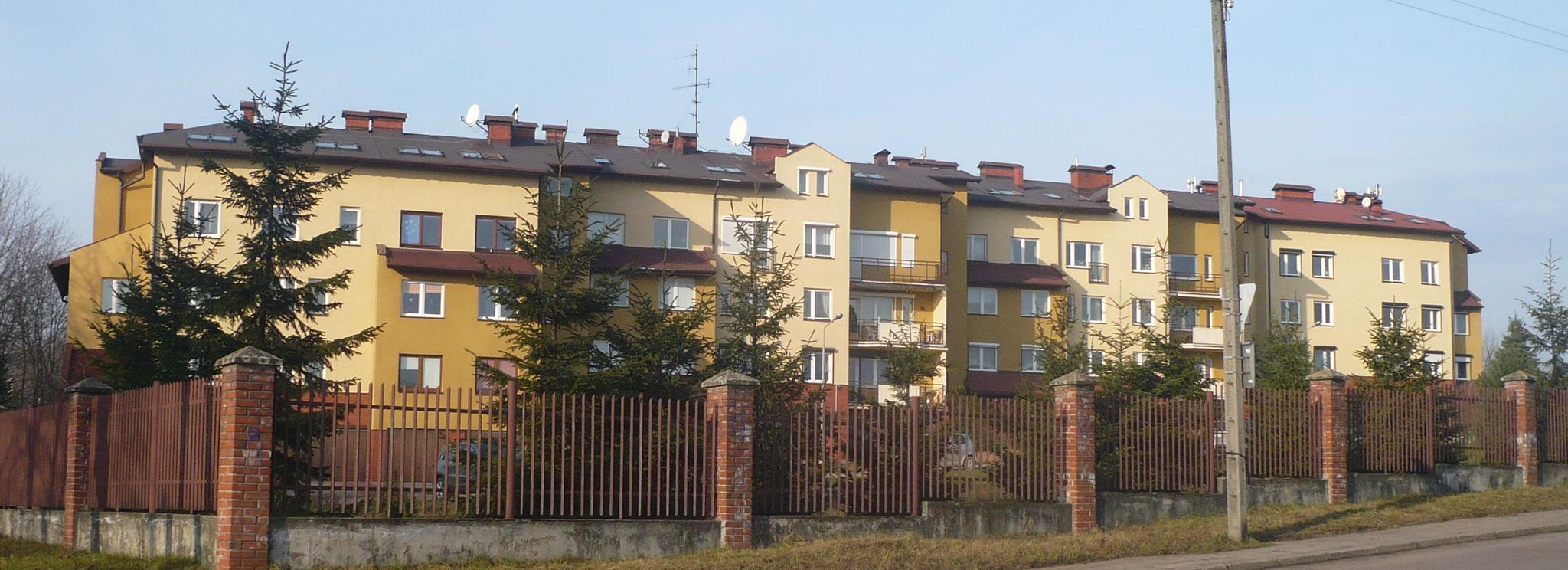 Apartamentowiec w Łodzi, na osiedlu Stoki, pomiędzy ulicami: Dębowskiego, Henrykowską i Skalną